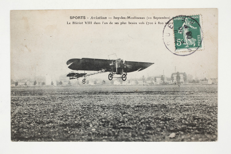 Sports - Aviation - Issy-les-Moulineaux (10 septembre) - Le Blériot VIII dans l'un de ses plus beaux vols (700 à 800 mètres) Circuit en boucle, du 7 au 17 août 1910, reliant les villes de Troyes, Nancy, Charleville-Mézières, Douai et Amiens. Éditeur: N.D. HOT Adresse actuelle : Héliport Date : 1910